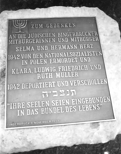 Gedenktafel für deportierte jüdische Mitbürger aus Bingerbrück